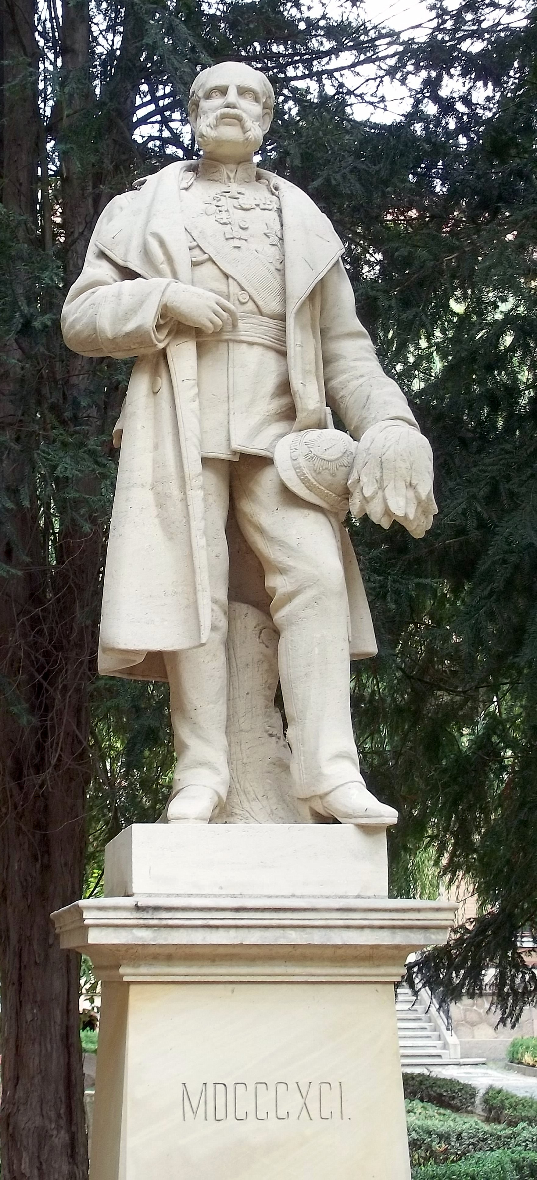 König-Albert-Statue im Hofgelände des Gymnasiums St. Augustin in Grimma